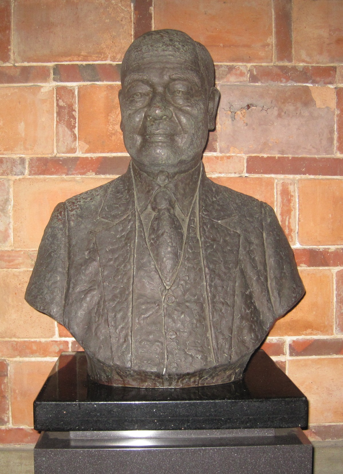 臺南赤崁樓的羽鳥又男銅像。